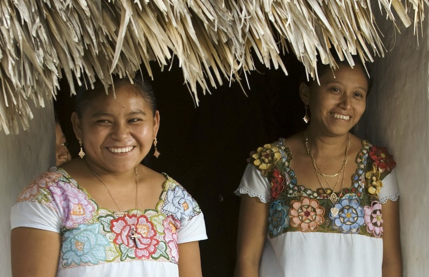 gente maya